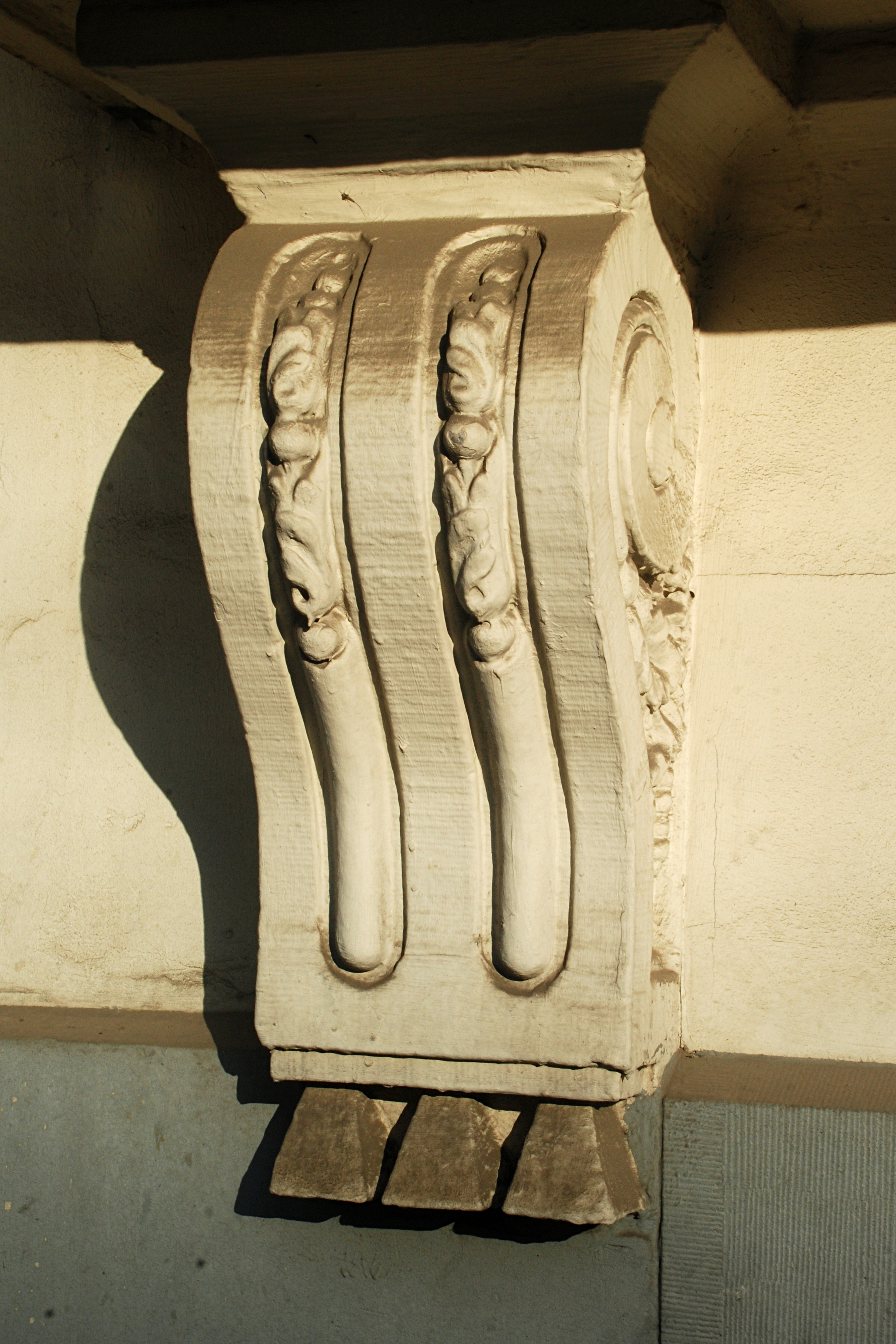 Belgique - Bruxelles - Place Royale - Hôtel des Brasseurs